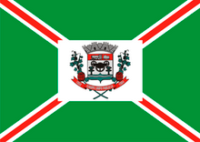 Bandeira da cidade de Campo Limpo Paulista.